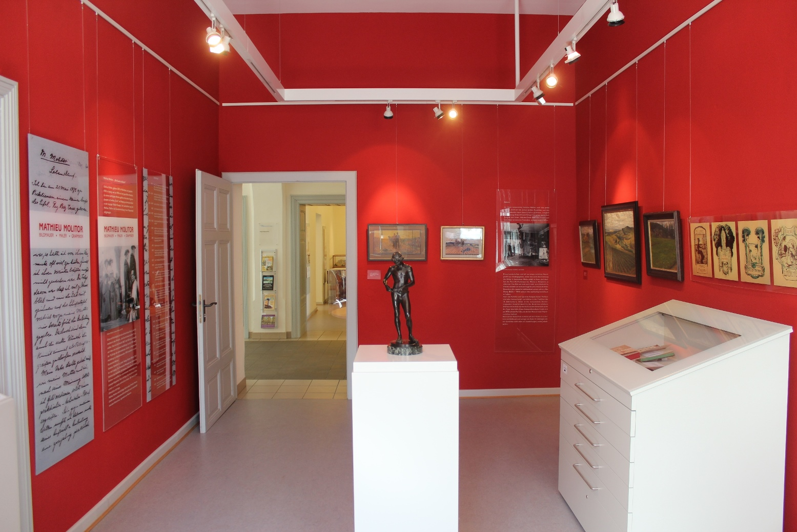 Der Ausstellungsraum "Mathieu Molitor" widmet sich dem Leben und Werk des Eifler Malers, Bildhauers und Grafikers.